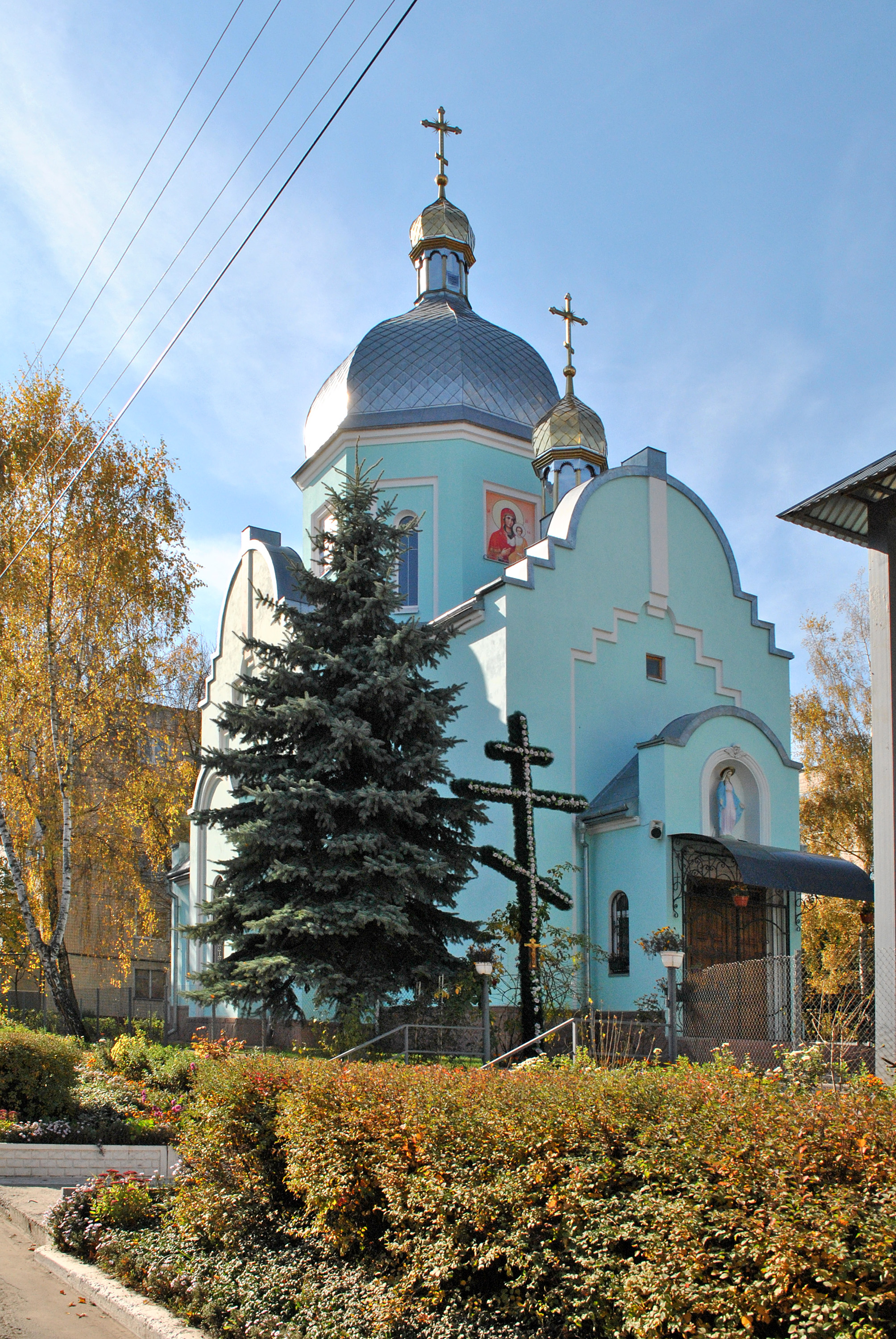 Храм Різдва Пресвятої Богородиці УПЦ КП (Тернопіль)